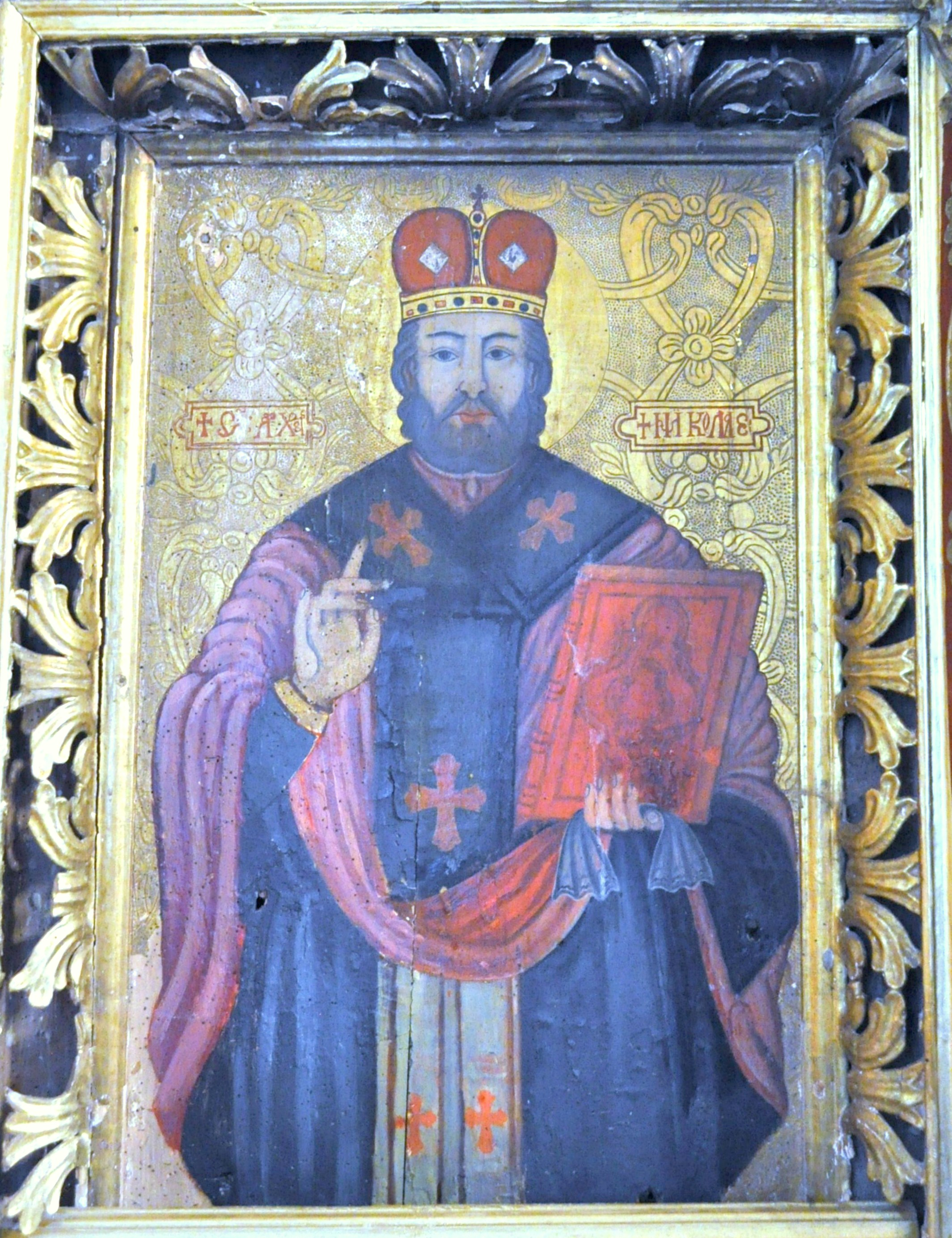 Biserica de lemn "Cuvioasa Paraschiva", sat IZVOARELE; comuna CERNEŞTI